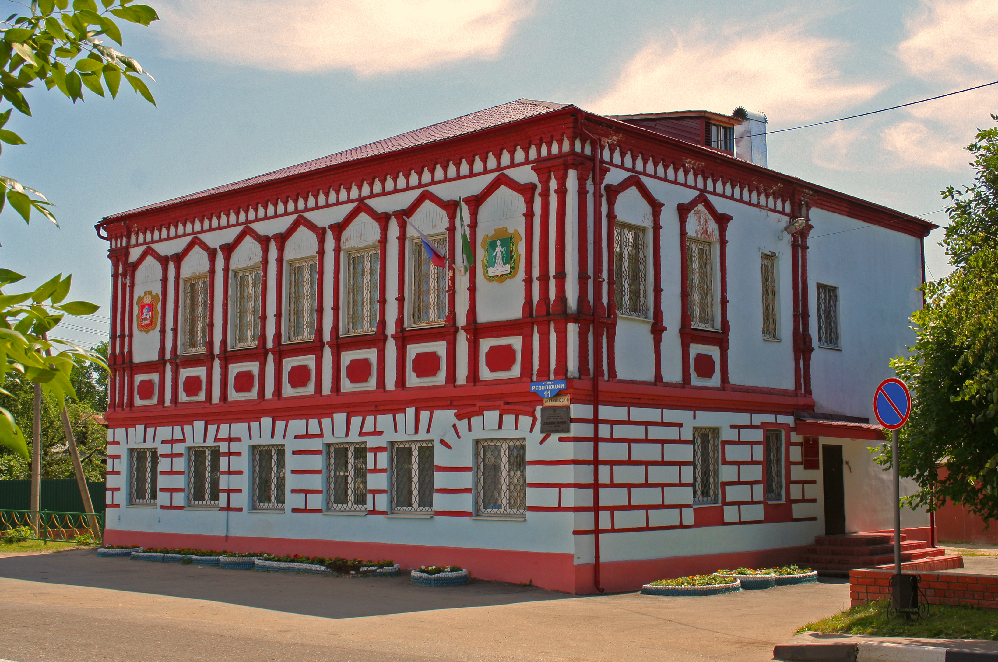 Stadtverwaltungsgebäude in Dresna, Oblast Moskau, Russland.